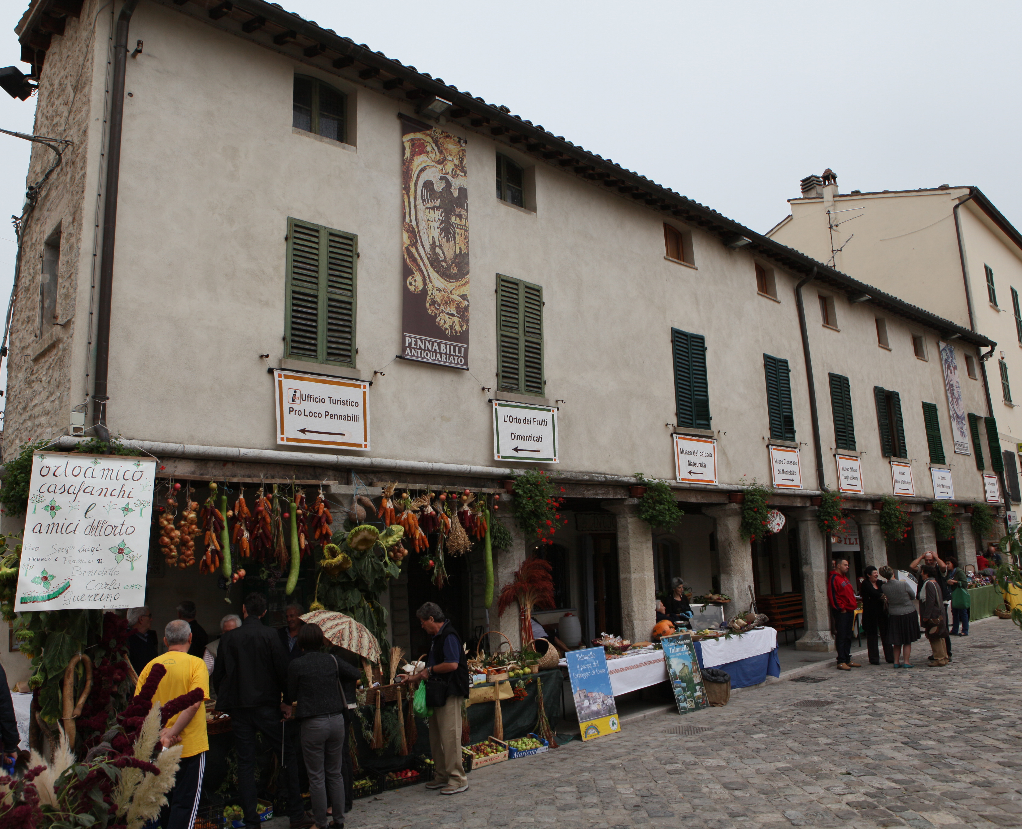 Palazzo della Ragione - detto Le Logge - MIBAC This is a photo of a monument which is part of cultural heritage of Italy.